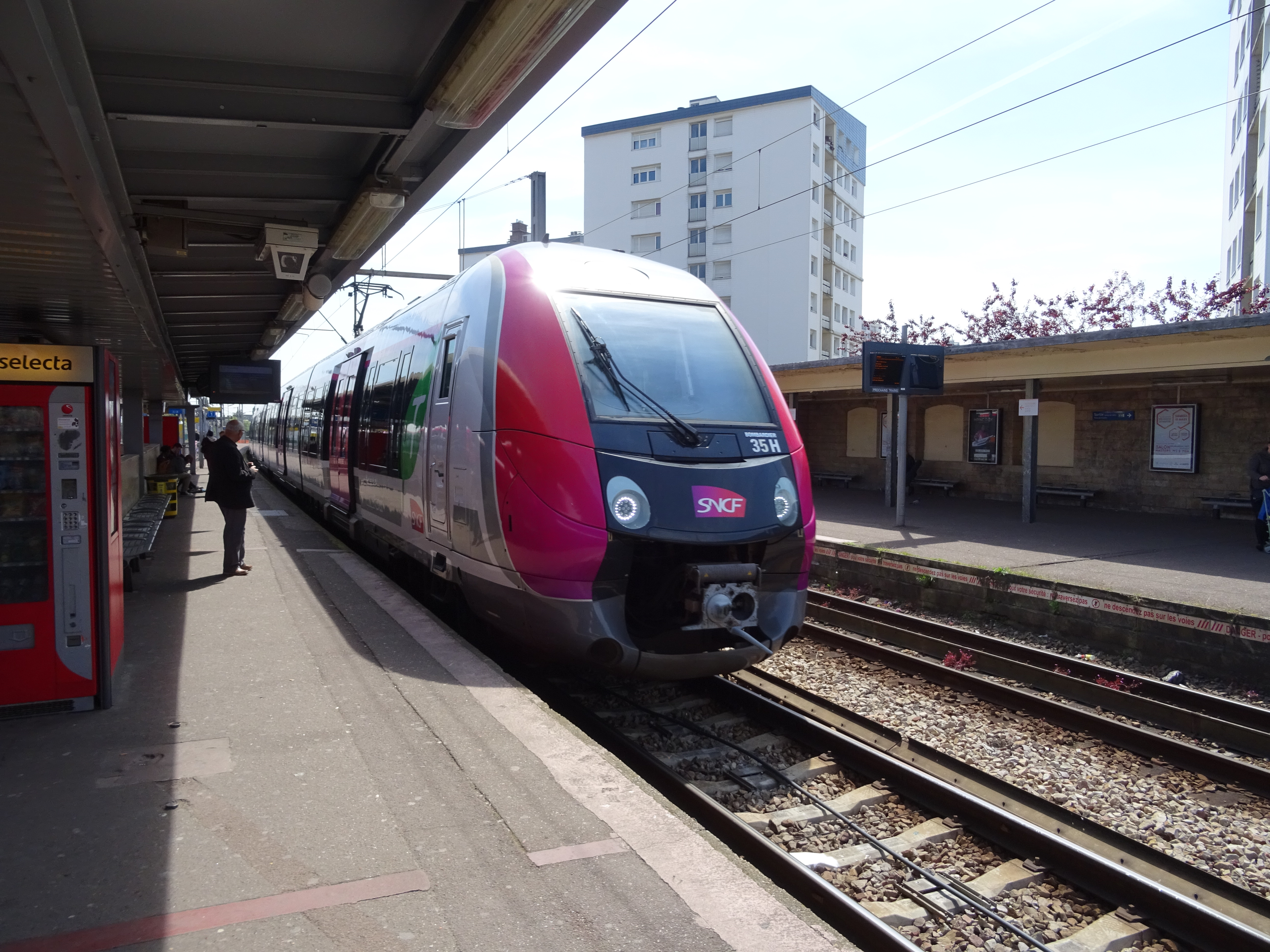 Francilien Transilien H en gare d'Epinay-Villetaneuse